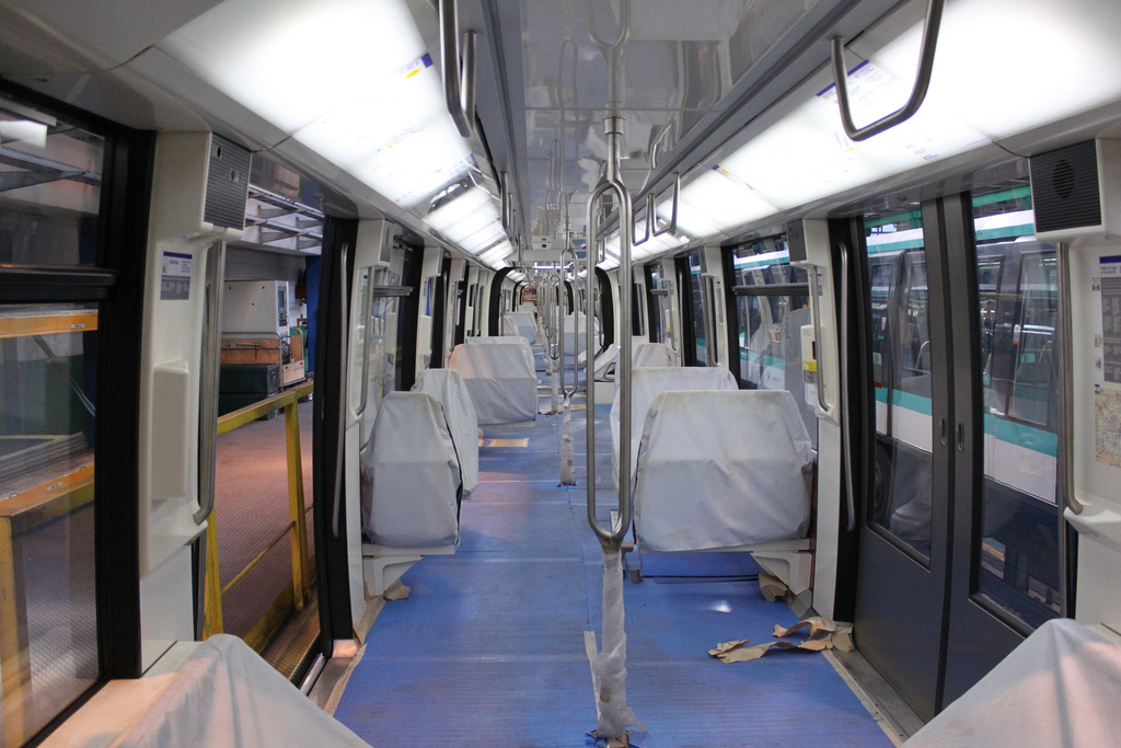 Un MP 05 dont le sol et les sièges sont protégés aux ateliers de Fontenay.